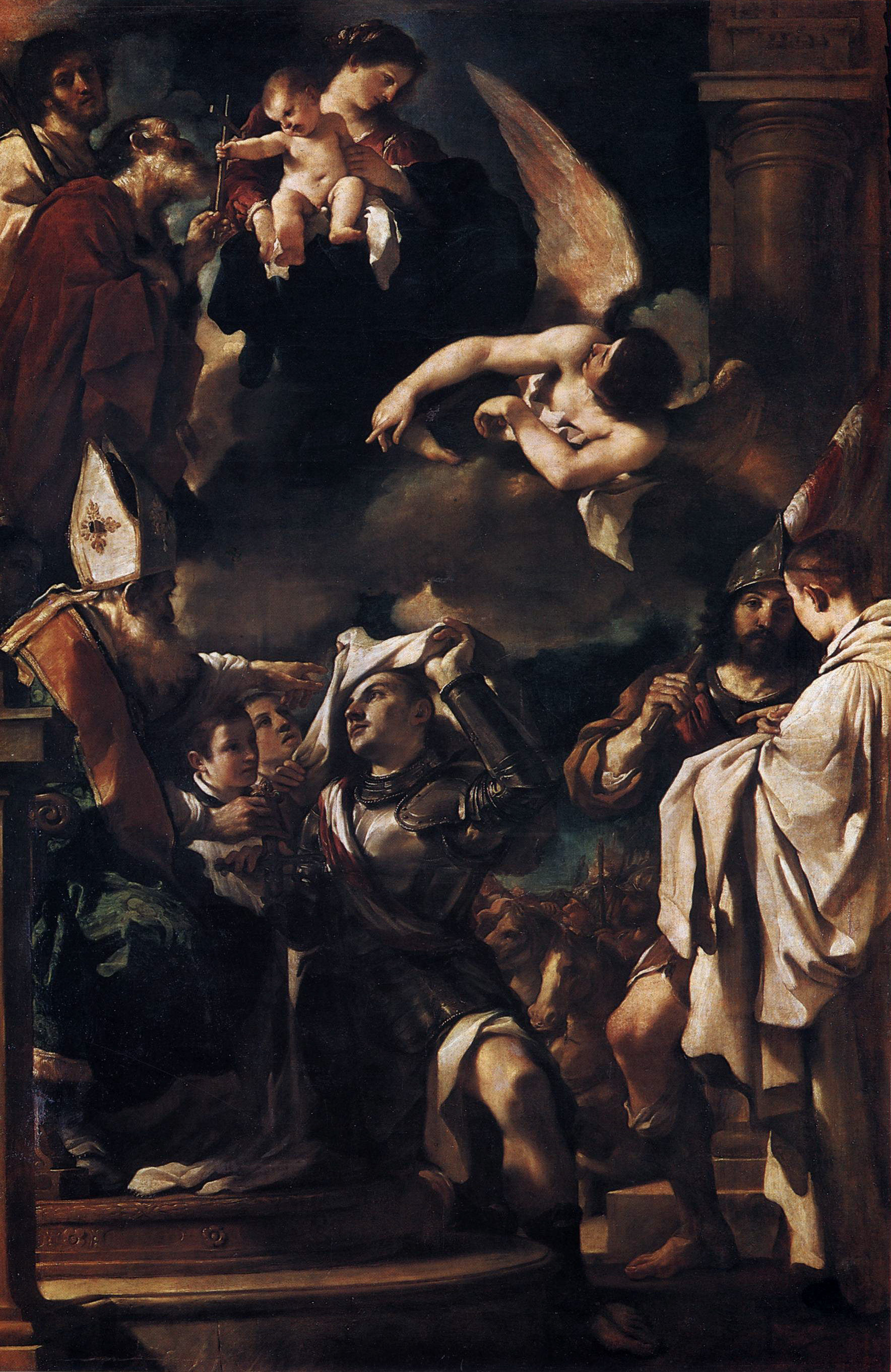 Vestizione di san Guglielmo d'Aquitania - Olio su tela, cm. 345 x 231